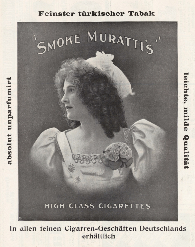 Zigarettenwerbung